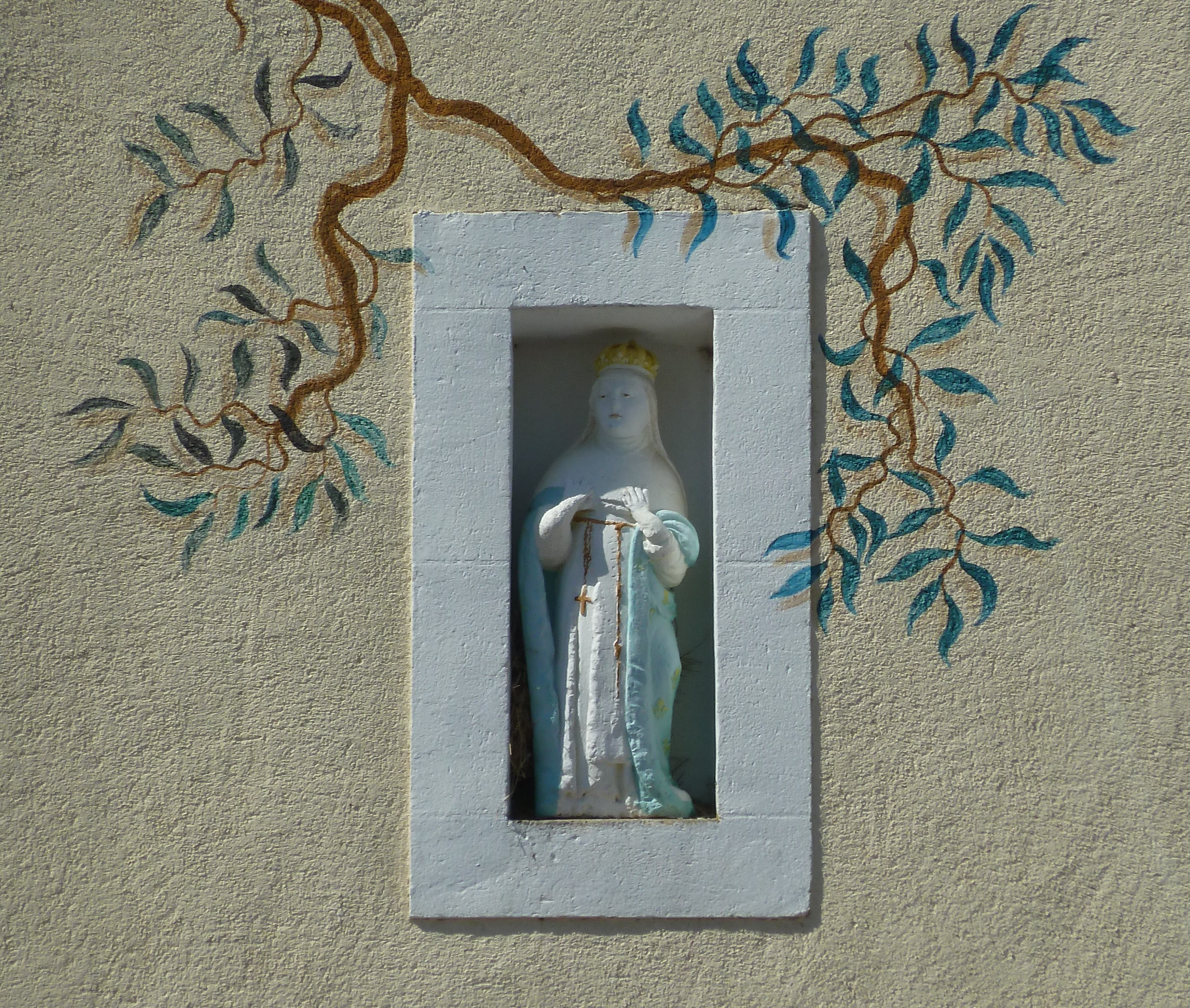 Statue de Sainte Montaine du village de Sainte-Montaine département du Cher.- Région Centre-Val_de_Loire France